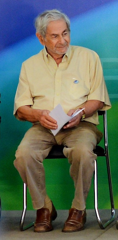 Raduan Nassar em ato de apoio à presidenta Dilma Rousseff, no Palácio do Planalto (Antonio Cruz/Agência Brasil)